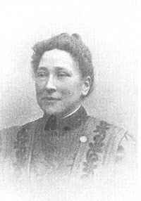 Maria Gezina Kramers